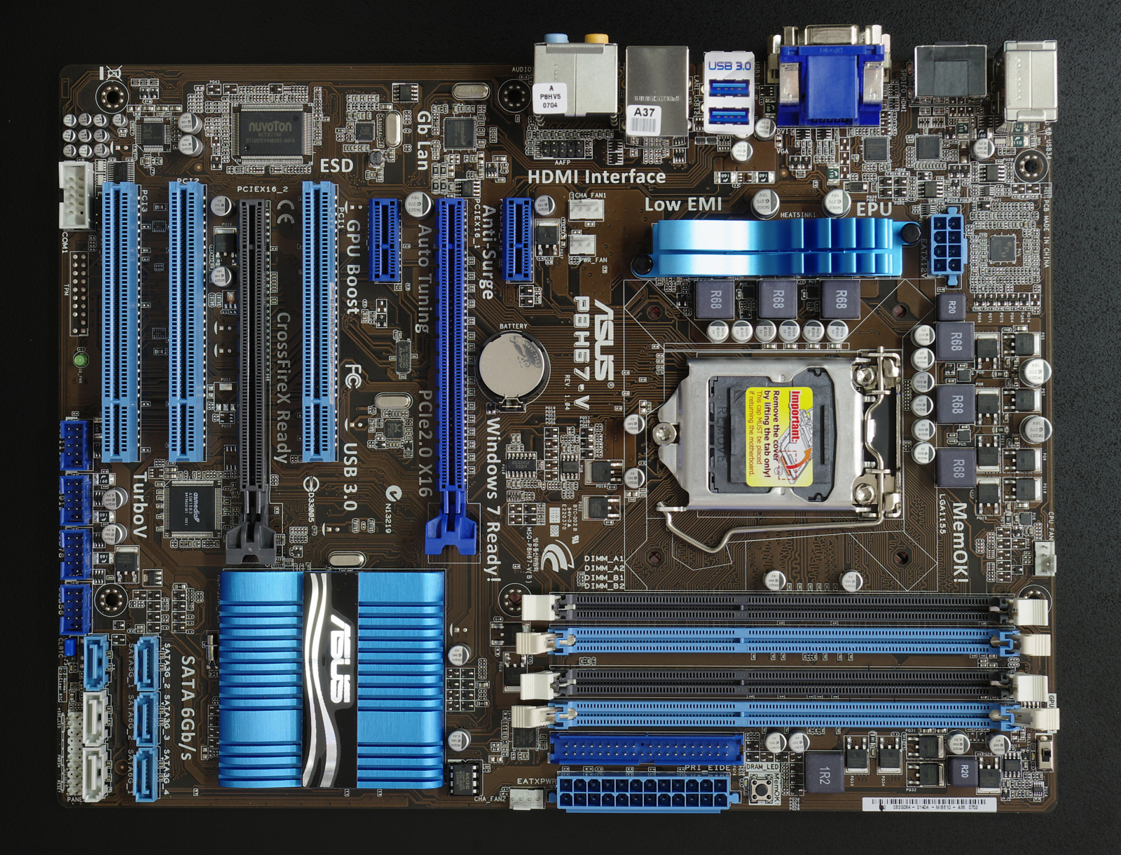 Mainboard Asus, Socket 1155, "Sandy Bridge"